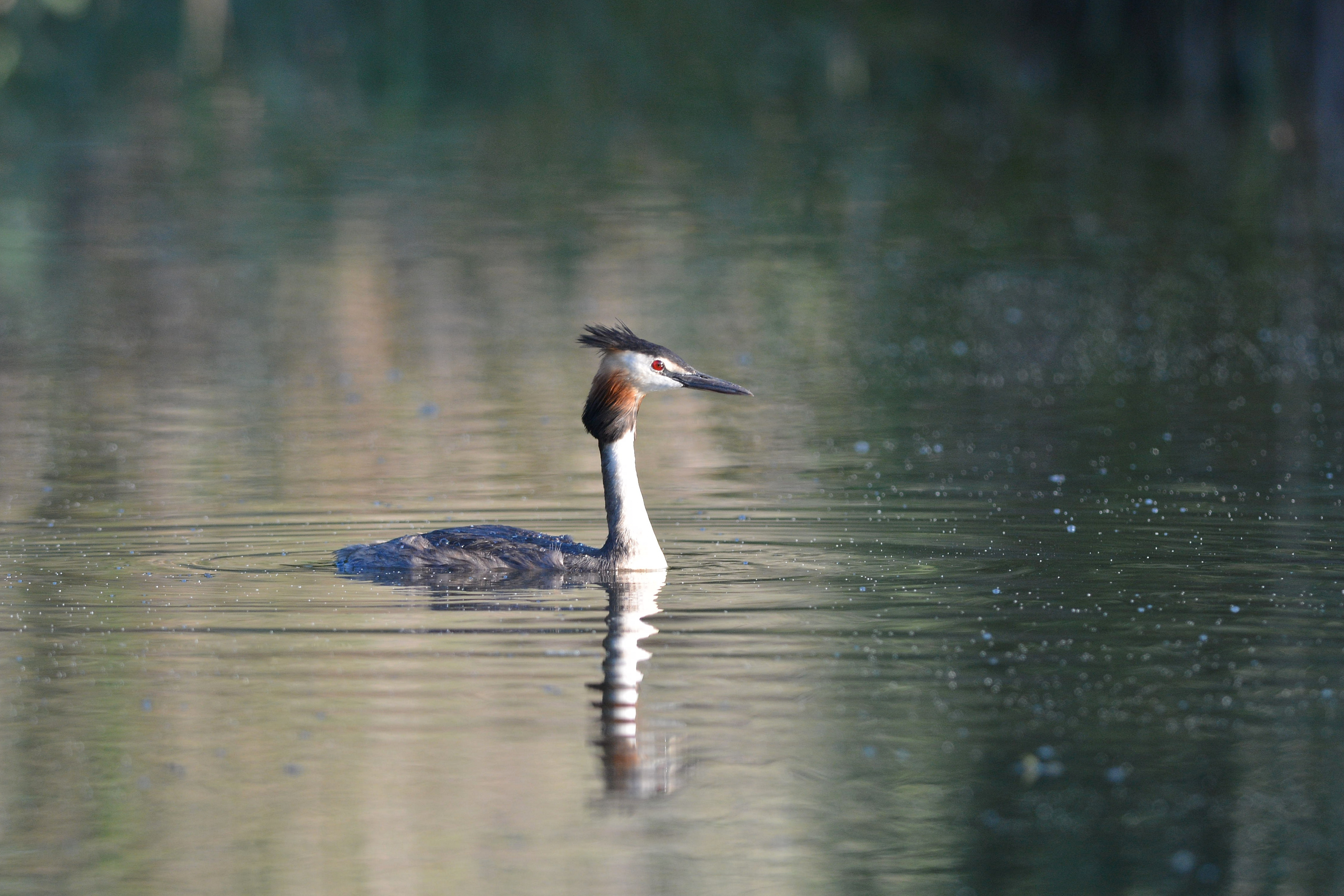 Один з типових представників гніздової навколоводної орнітофауни України